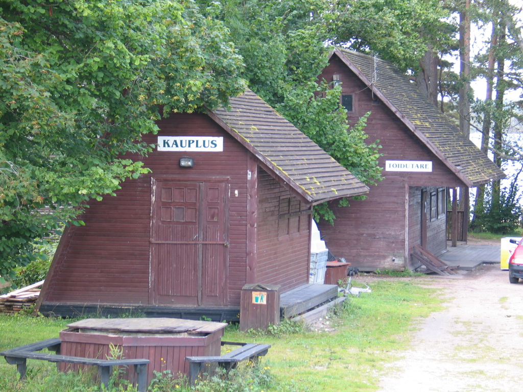 Karujärve kämpingu kauplus ja söögitare